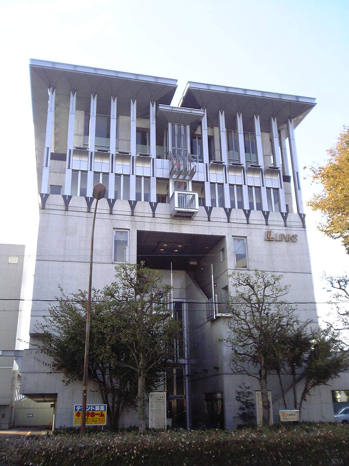 FM滋賀本社・演奏所が入居するリンクスビル（2009/10/11撮影）